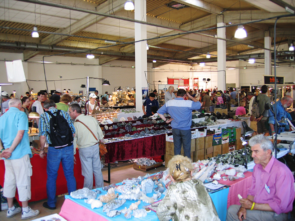 En un pabellón de la feria de Sainte-Marie-aux-Mines